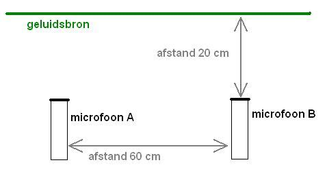 Schematische weergave van een A-B microfoon opstelling. De afstand tussen beide microfoons is 3 maal de afstand tot de geluidsbron.